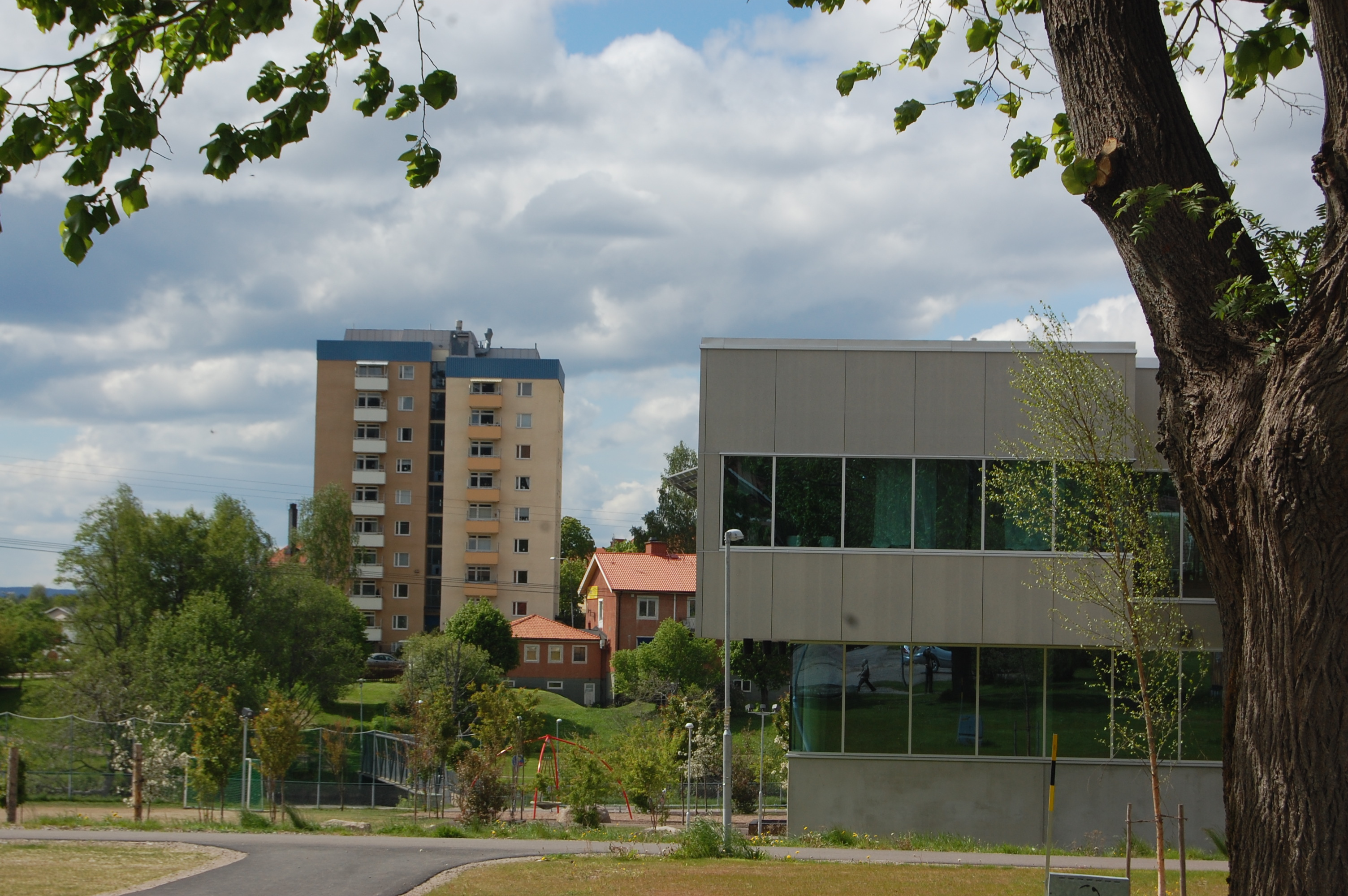 Hagfors i Värmland